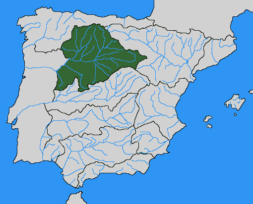 Cuenca hidrográfica del río Duero, España